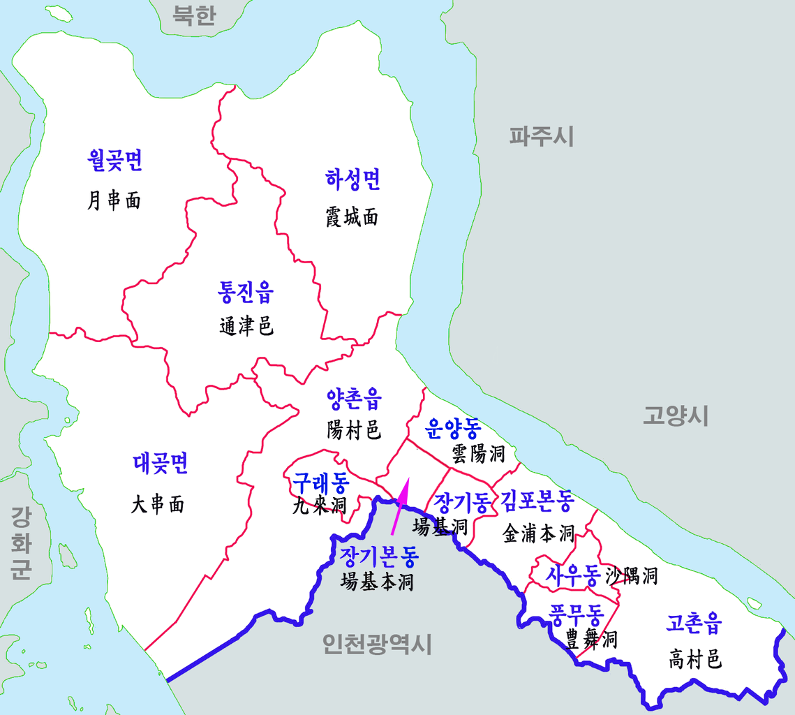 김포시 행정구역